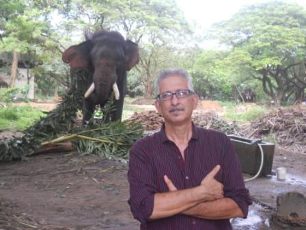 Zappalà Elefante